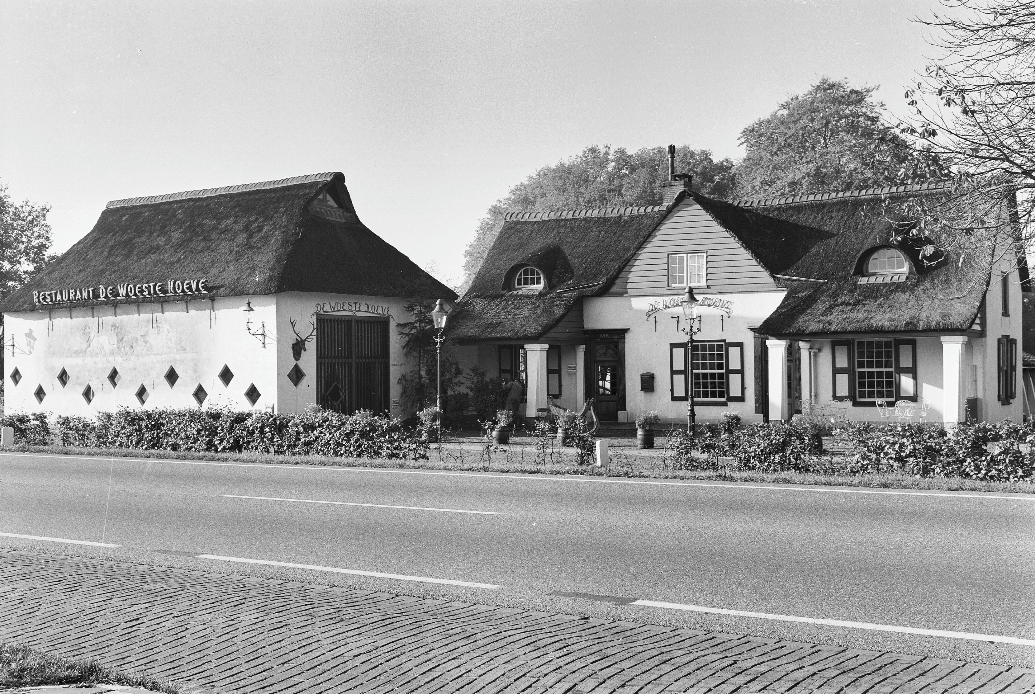 De Woeste Hoeve", aanzicht